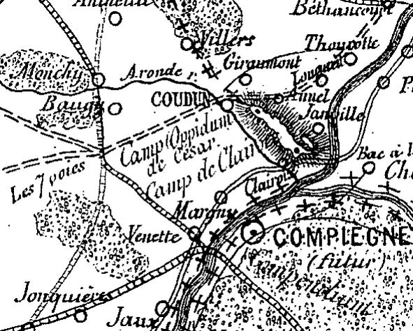 Chemins gaulois avant la conquête de César- extrait de Origines de Compiègne- M le Bon de Bicquilley - page 66 - Doc BnF